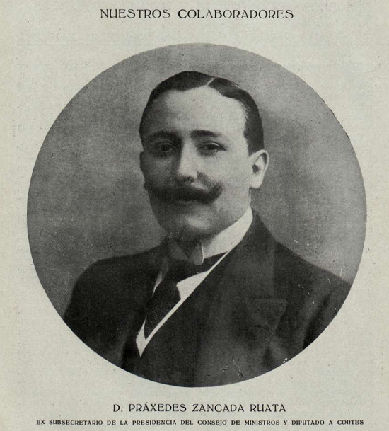 Retrato de Práxedes Zancada.